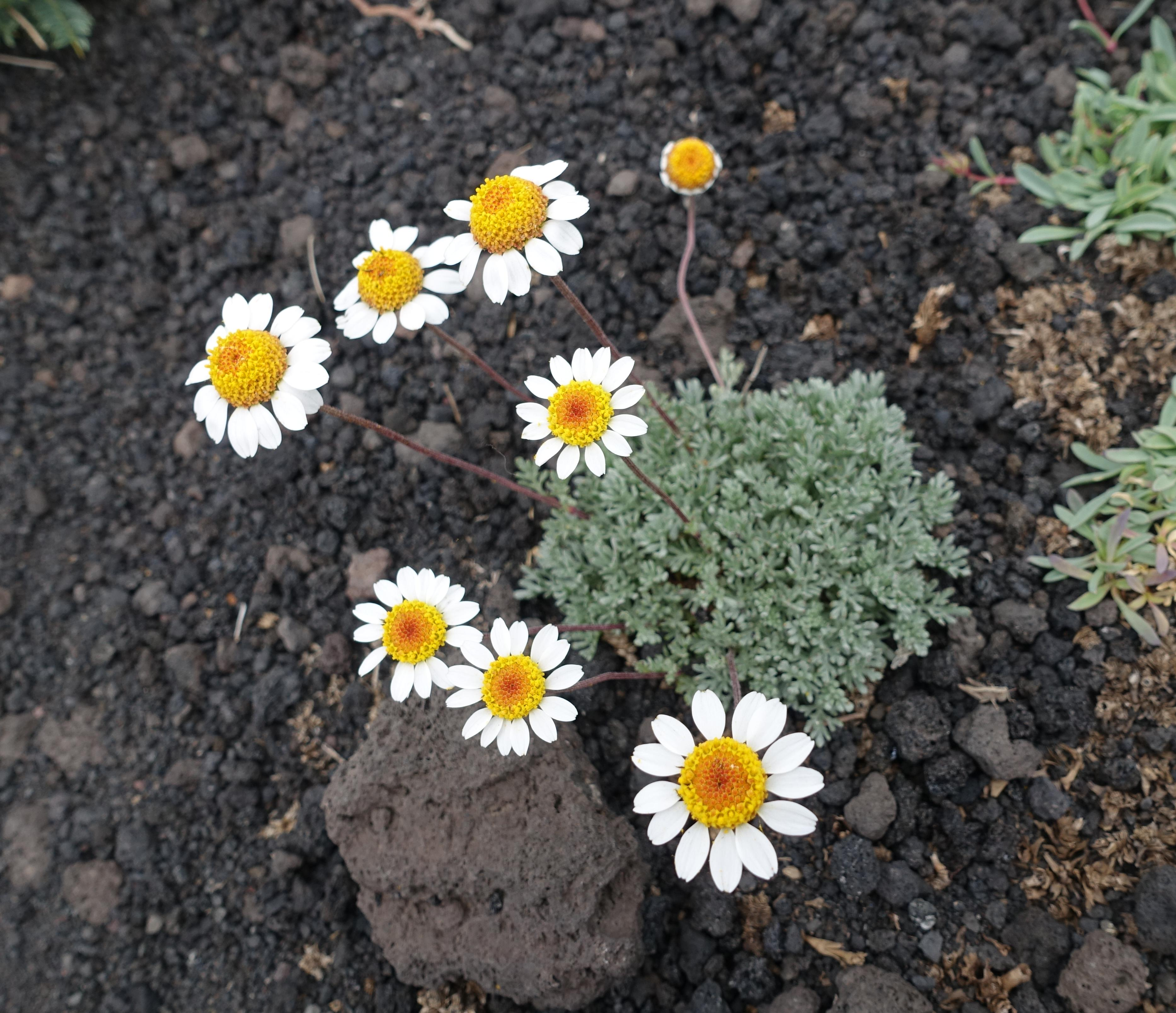 Anthemis aetnensis, photographié au refuge Sapienza à 1900 m, sur le mont Etna